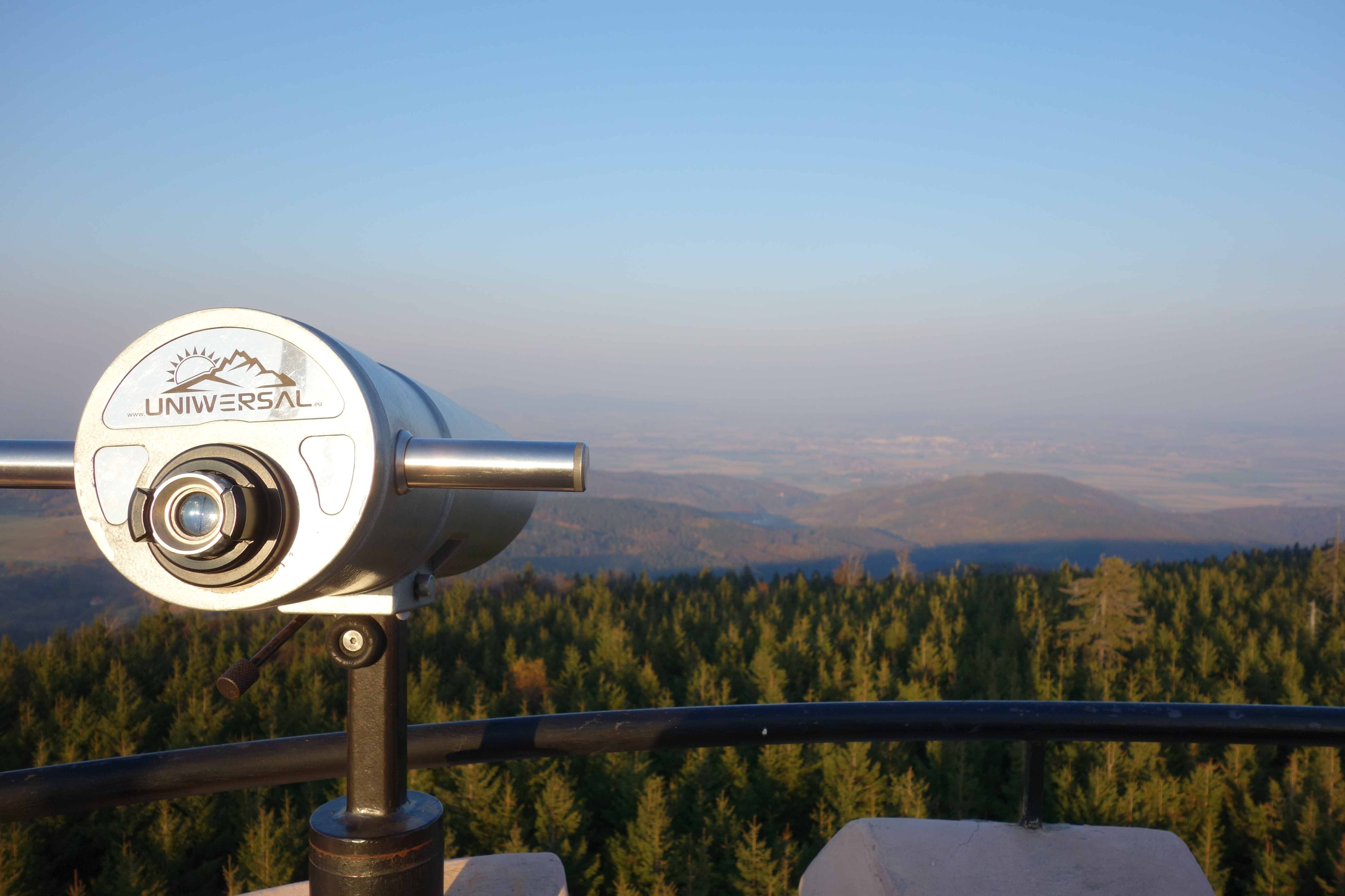 Widok z balkonu widokowego w kierunku Pieszyc i Kotliny Dzierżoniowskiej